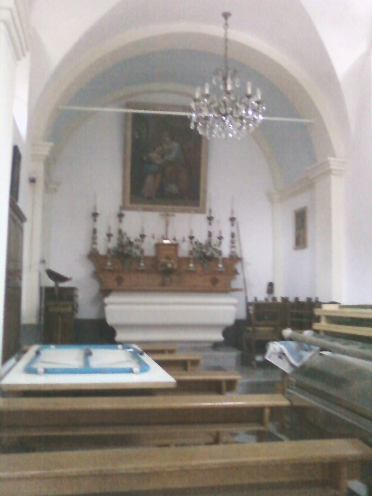 Interno della cappella di Sant'Anna in Sassello SV (Italy)